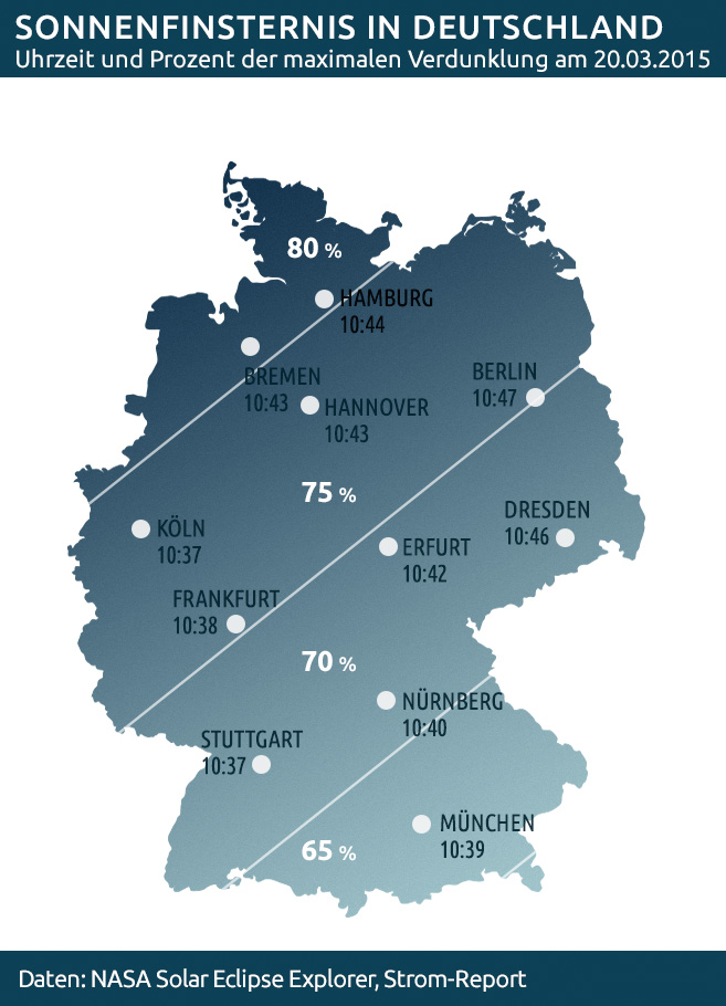 Sonnenfinsternis in Deutschland 2015: Uhrzeit und Prozent der maximalen Verdunklung. Die Werte wurden mit dem Nasa Solar Eclipse Explorer ermittelt.